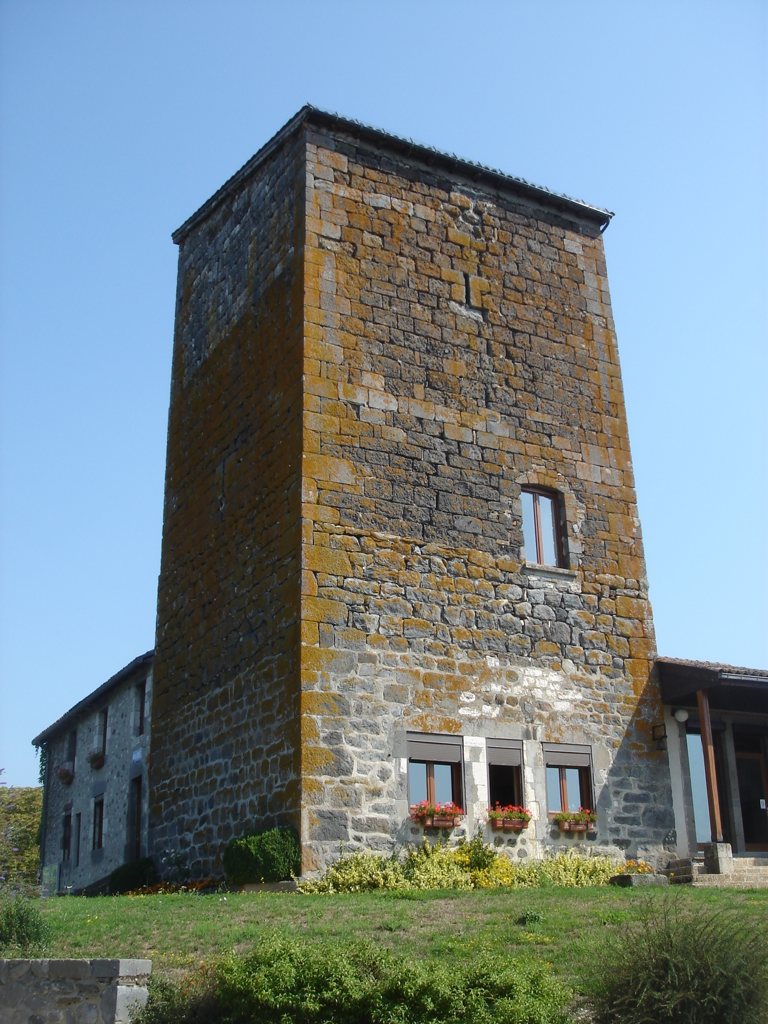 Tour de Naucelles